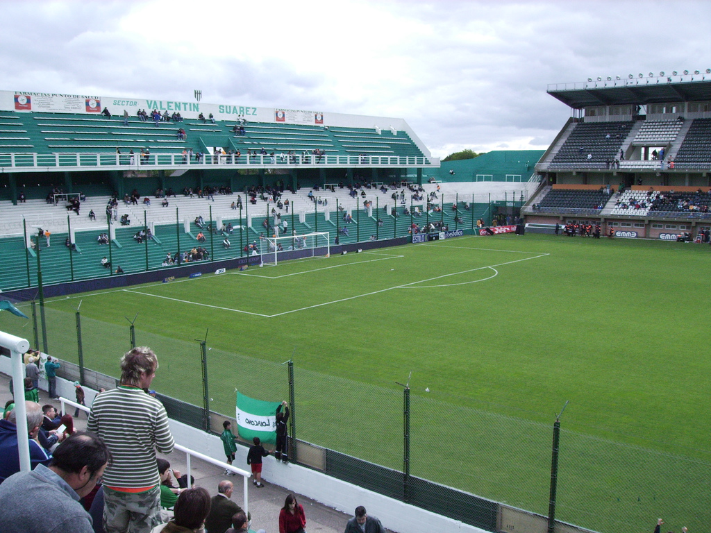 lencho sola